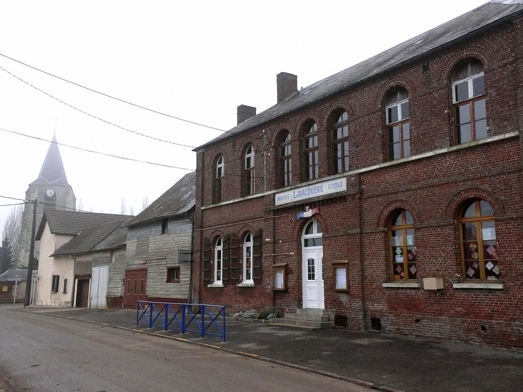 La mairie-école de Lavacquerie (Oise). Au second plan, l'église Saint-Firmin